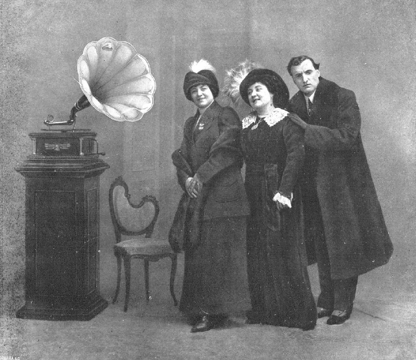 Fotografía promocional en la que se ve a los cantantes españoles Emilio Sagi Barba, Luisa Vela y Peligros Pujol escuchando un disco impresionado por el primero.